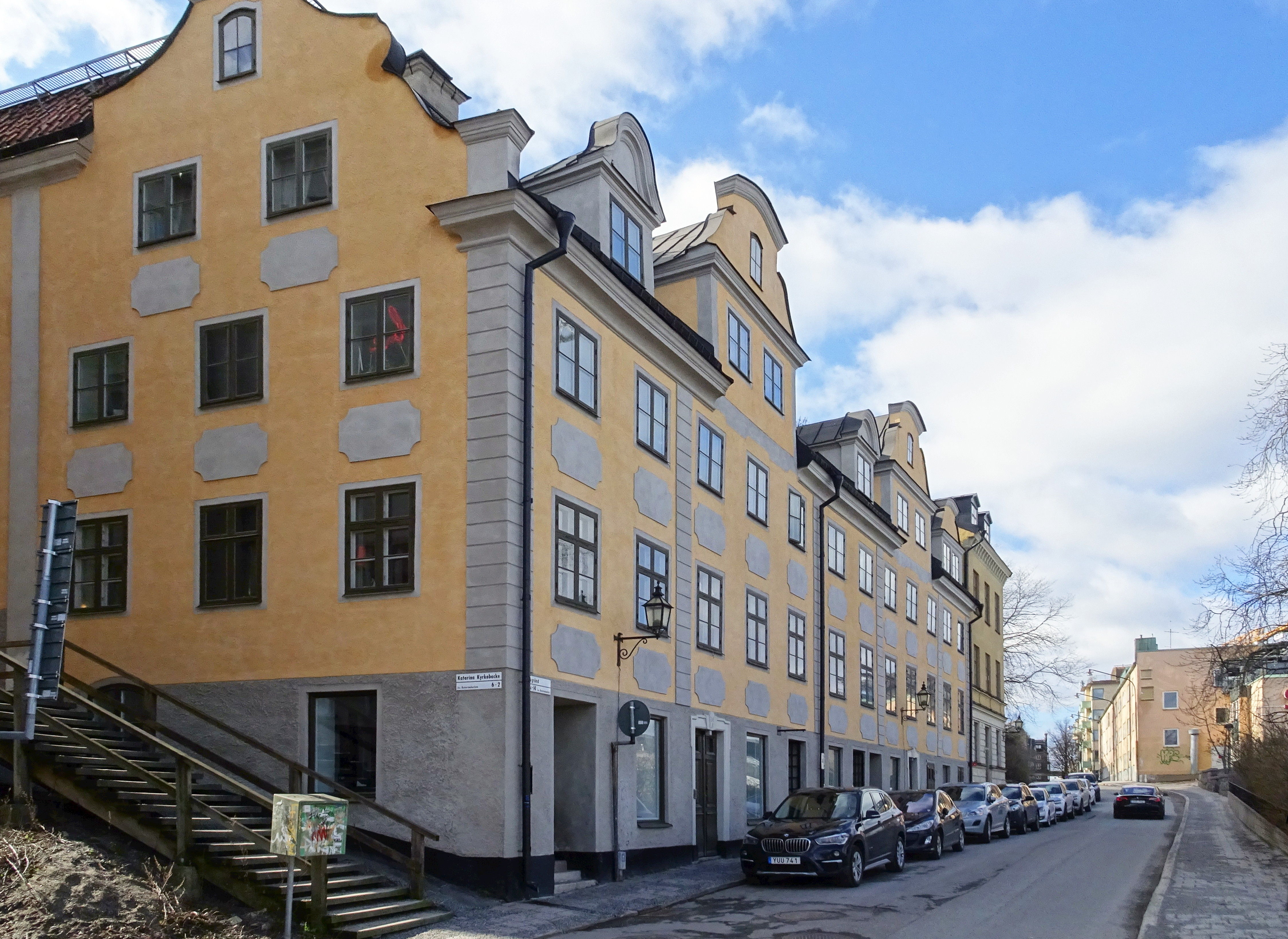 Huset Klevgränd 16 / Katarina kyrkobacke 1, fastigheten Katarinabacken 1 kallat Elias Kuhlmans hus från 1700-talets mitt